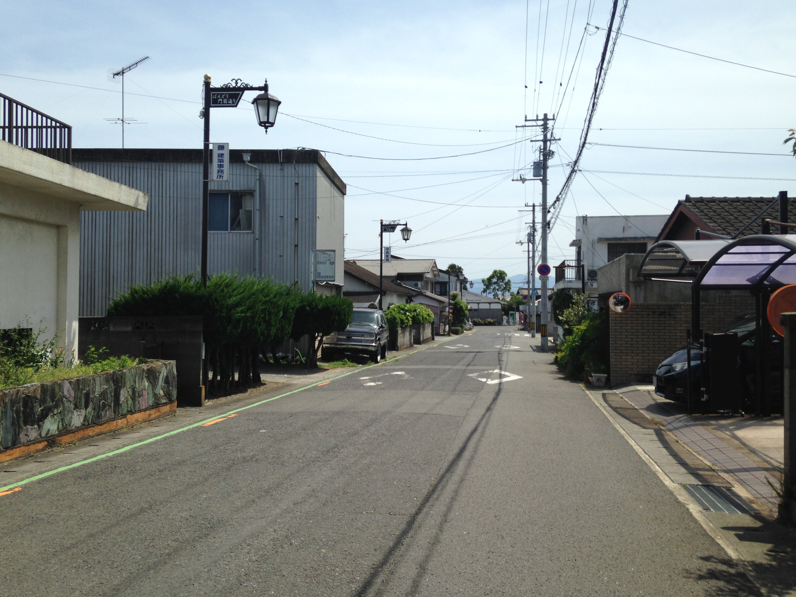 板東駅前のばんどう門前通り(徳島県道166号)